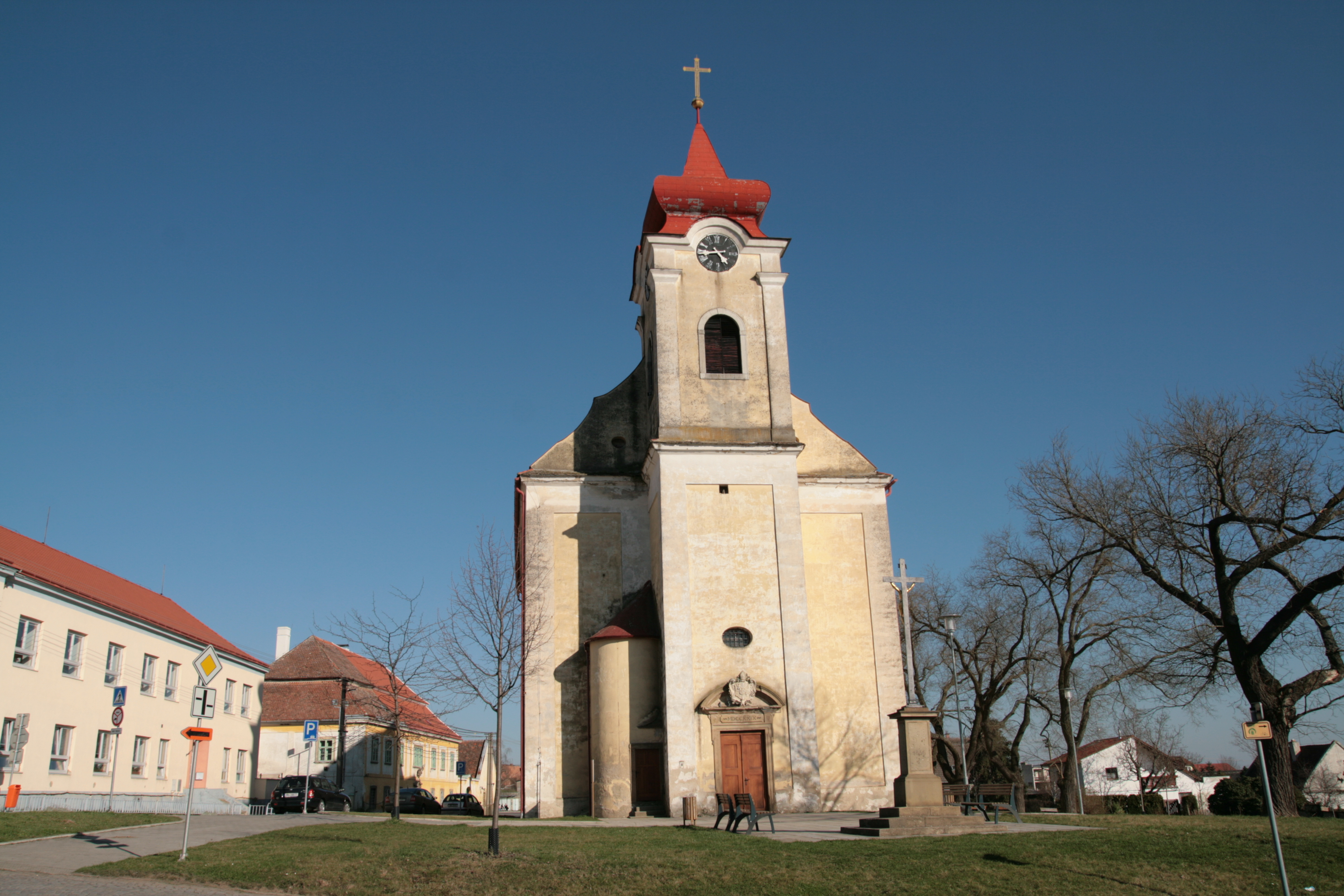 Město Miroslav v okrese Znojmo. Kostel sv. Petra a sv. Pavla. Vlevo budova domu dětí a mládeže.